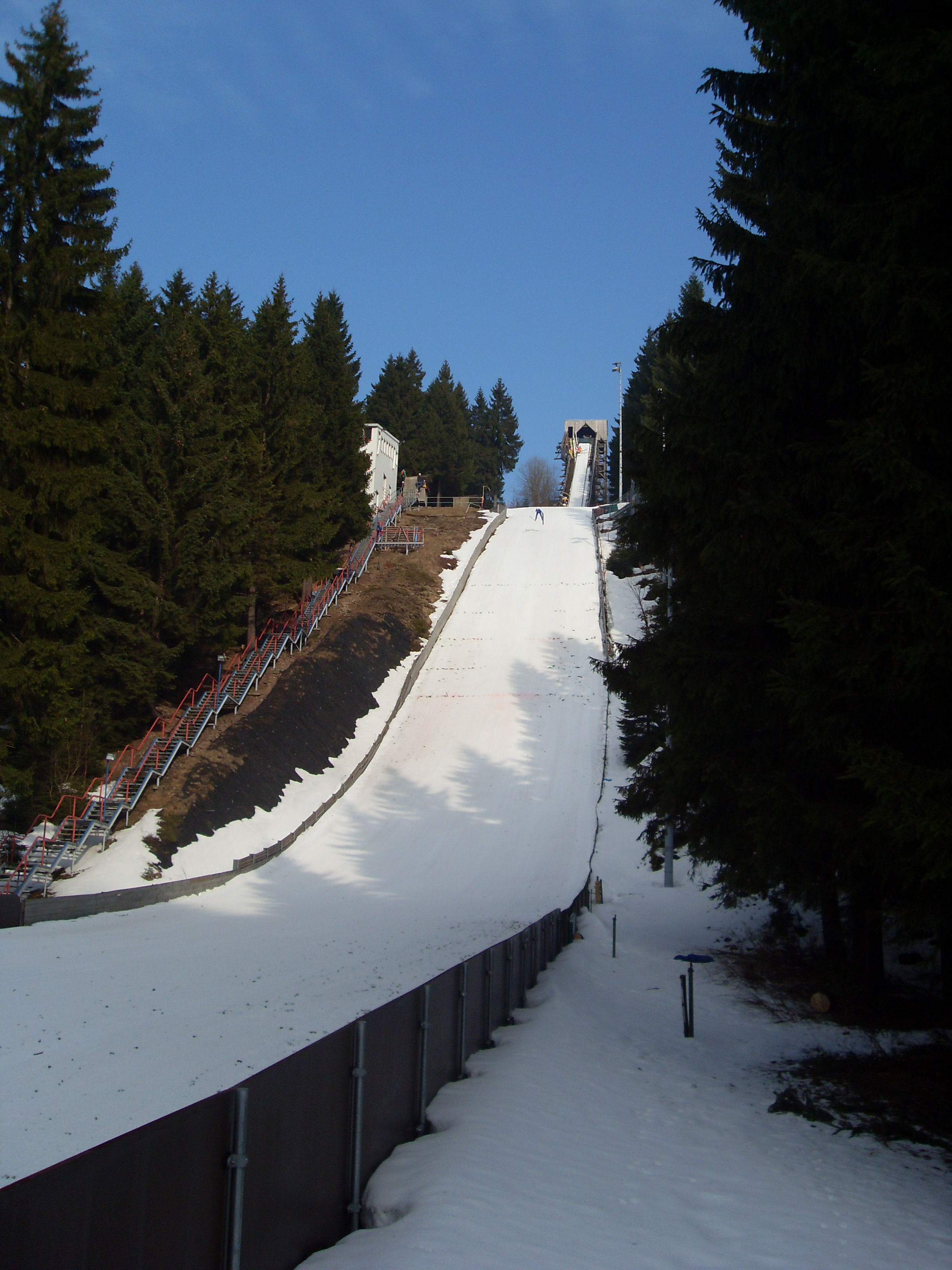 Wadebergschanze K66 in Oberhof, Germany. Original description: beim Training